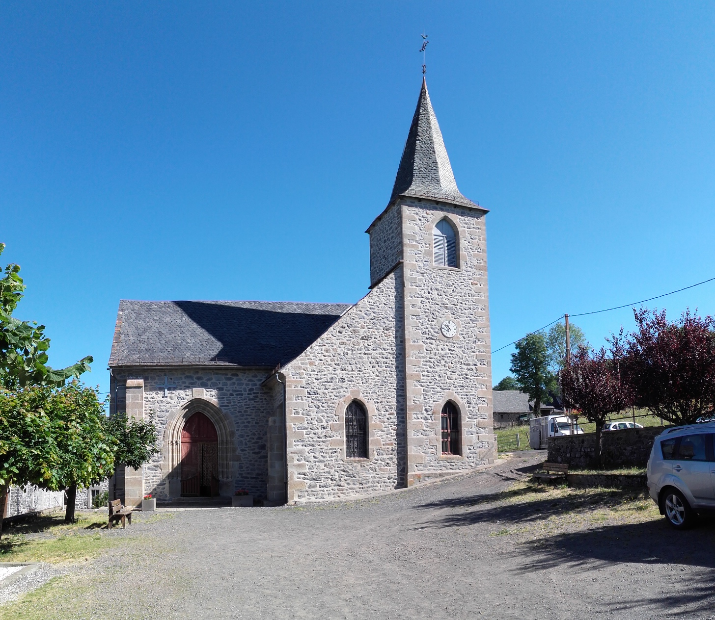 Eglise de Pradiers